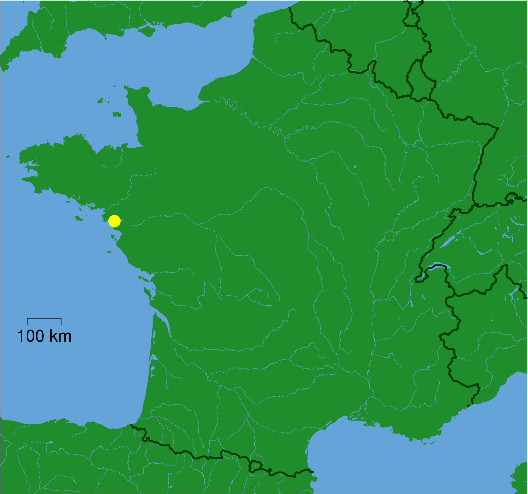 Frankreichkarte, markiert ist der Ort Saint-Nazaire